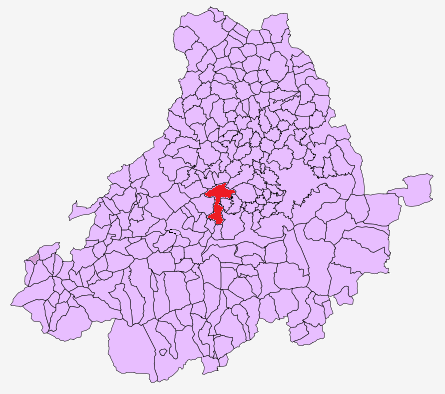 Término municipal de La Torre (Ávila), en el mapa de municipios de la provincia de Ávila, España.